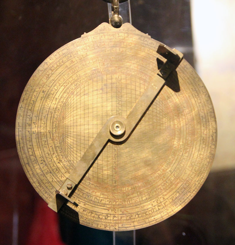 Astrolabe (Azafea) du XIe s. réalisé par Azarquiel (Al-Zarqali). Copie exposée dans la Torre de la Calahorra de Cordoue. Original à Barcelone.